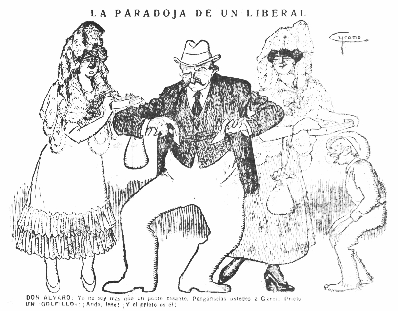 LA PARADOJA DE UN LIBERALDON ALVARO: Yo no soy más que un pobre cesante. Pongánselas ustedes a García Prieto.UN «GOLFILLO»: ¡Anda, leñe! ¡Y el prieto es él!—Cyrano